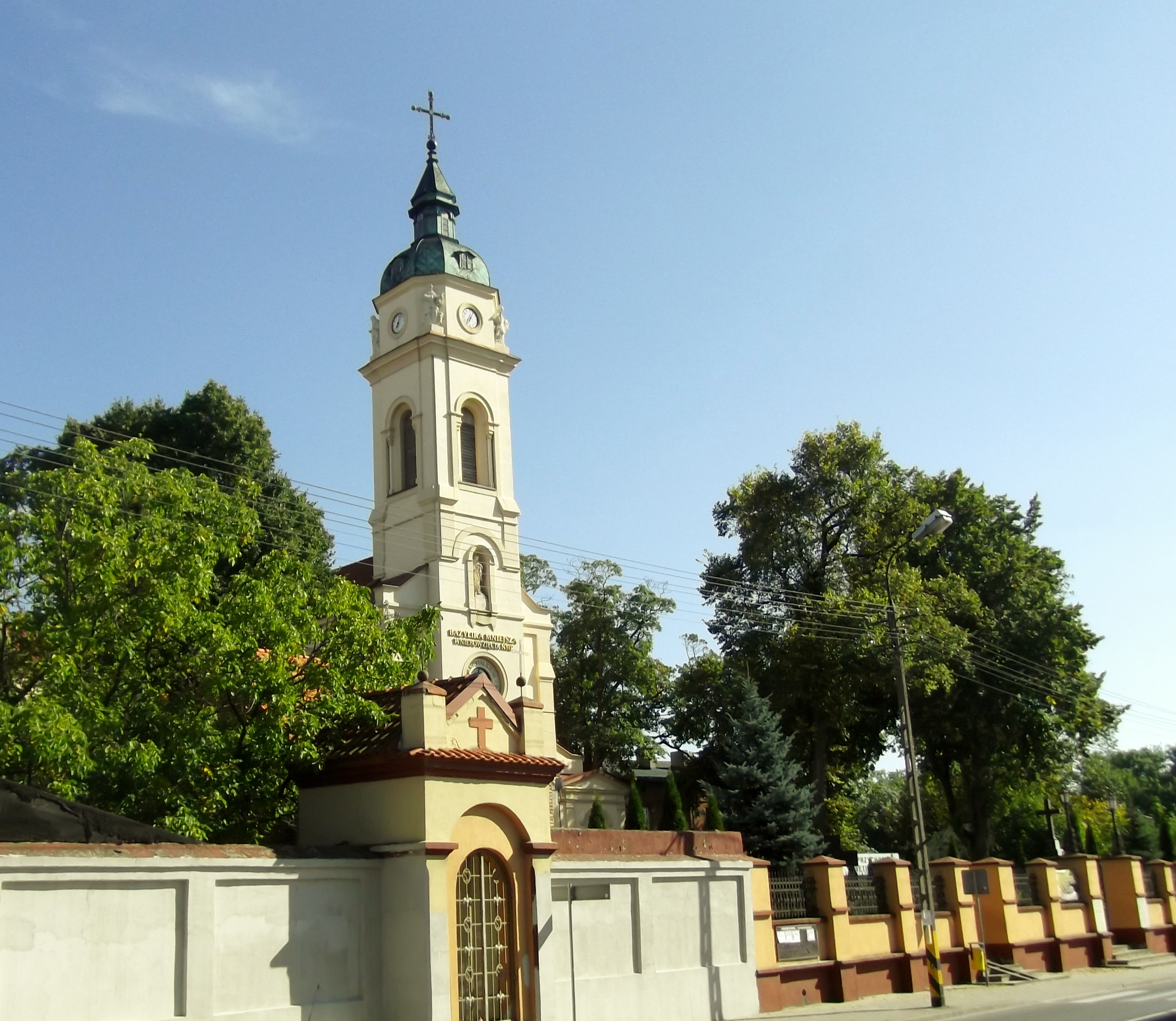 Zduńska Wola, kościół Wniebowzięcia NMP, 1891